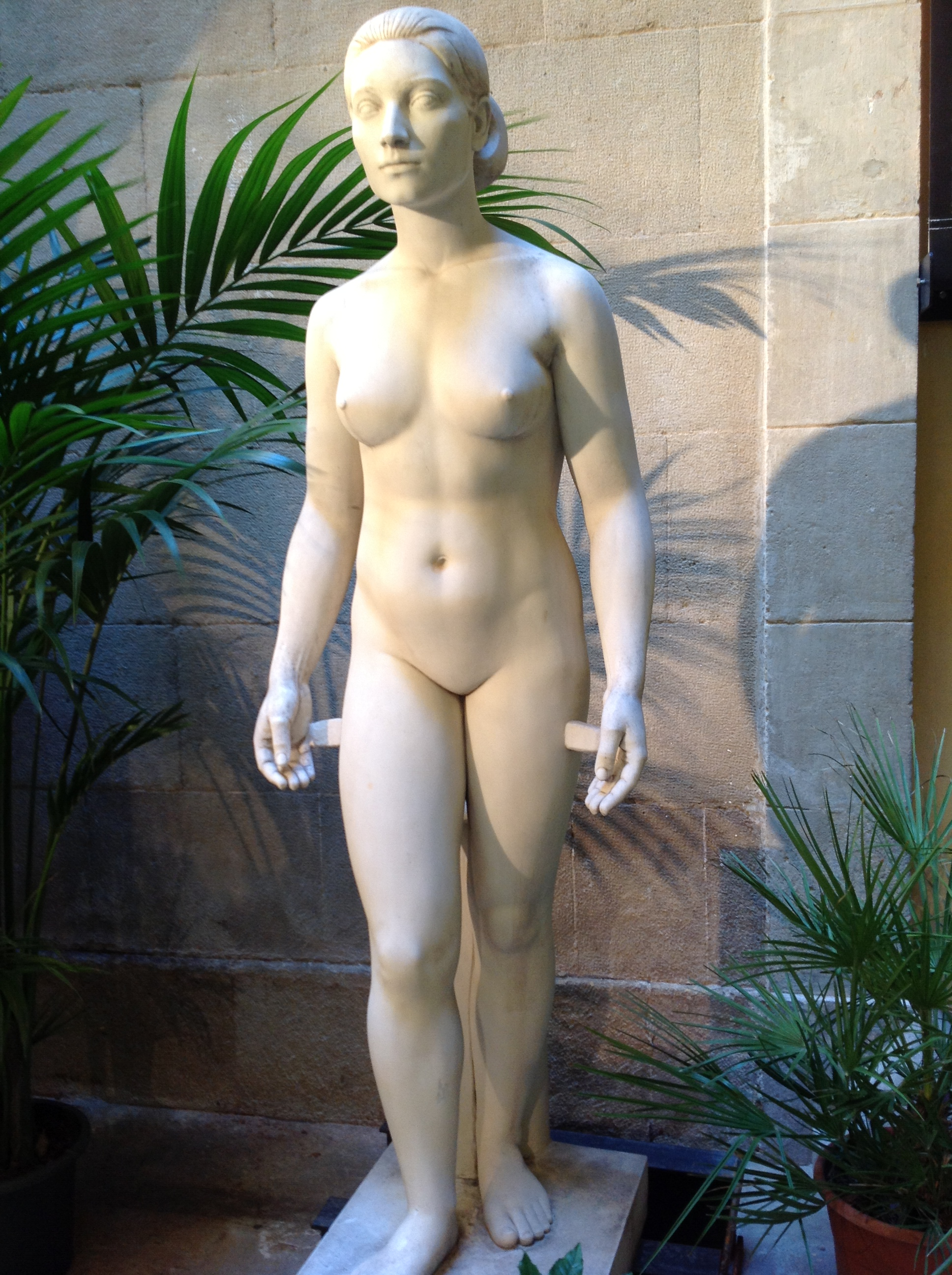 Ben plantada Joan Rebull